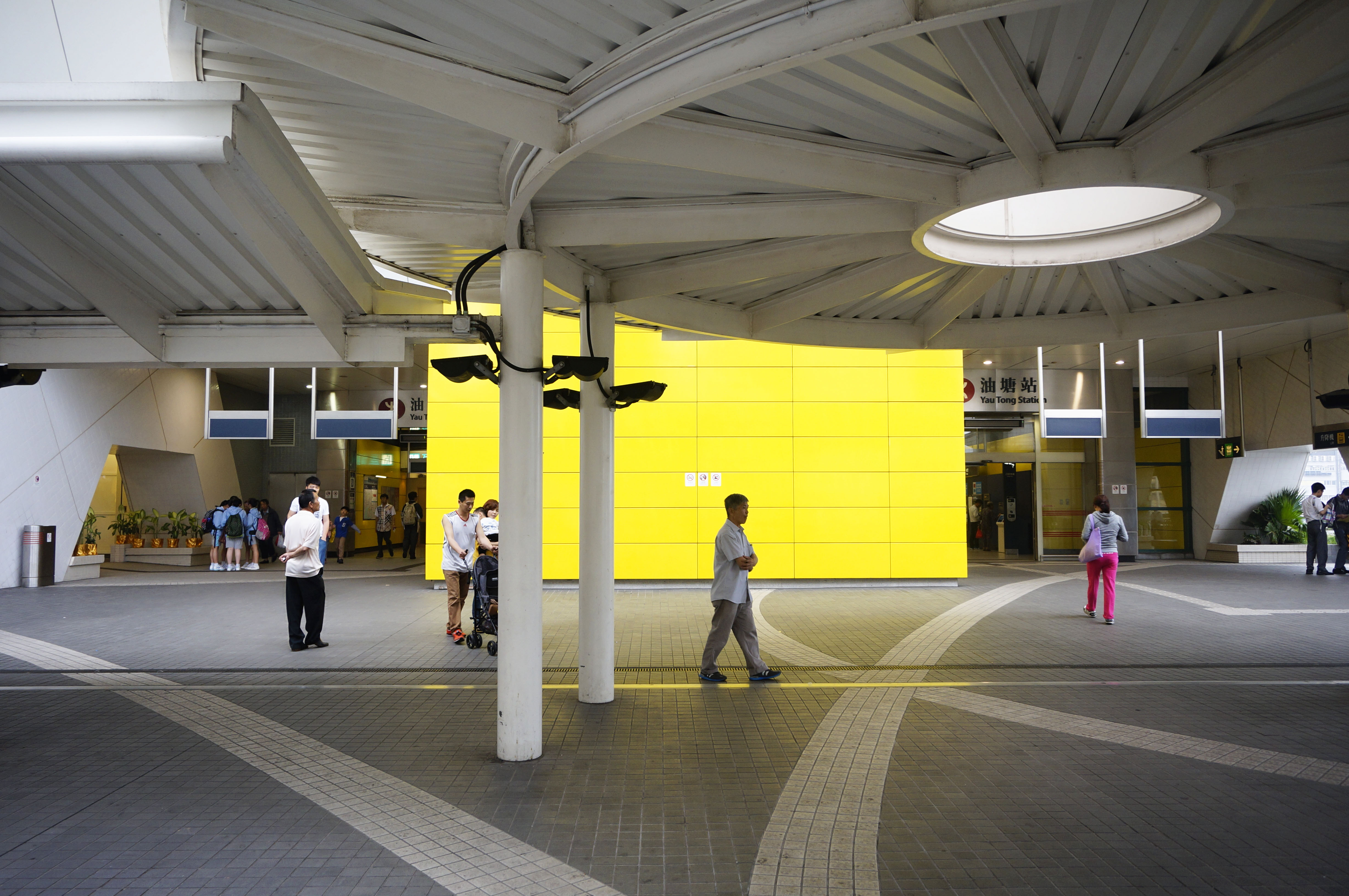 港鐵油塘站B出入口